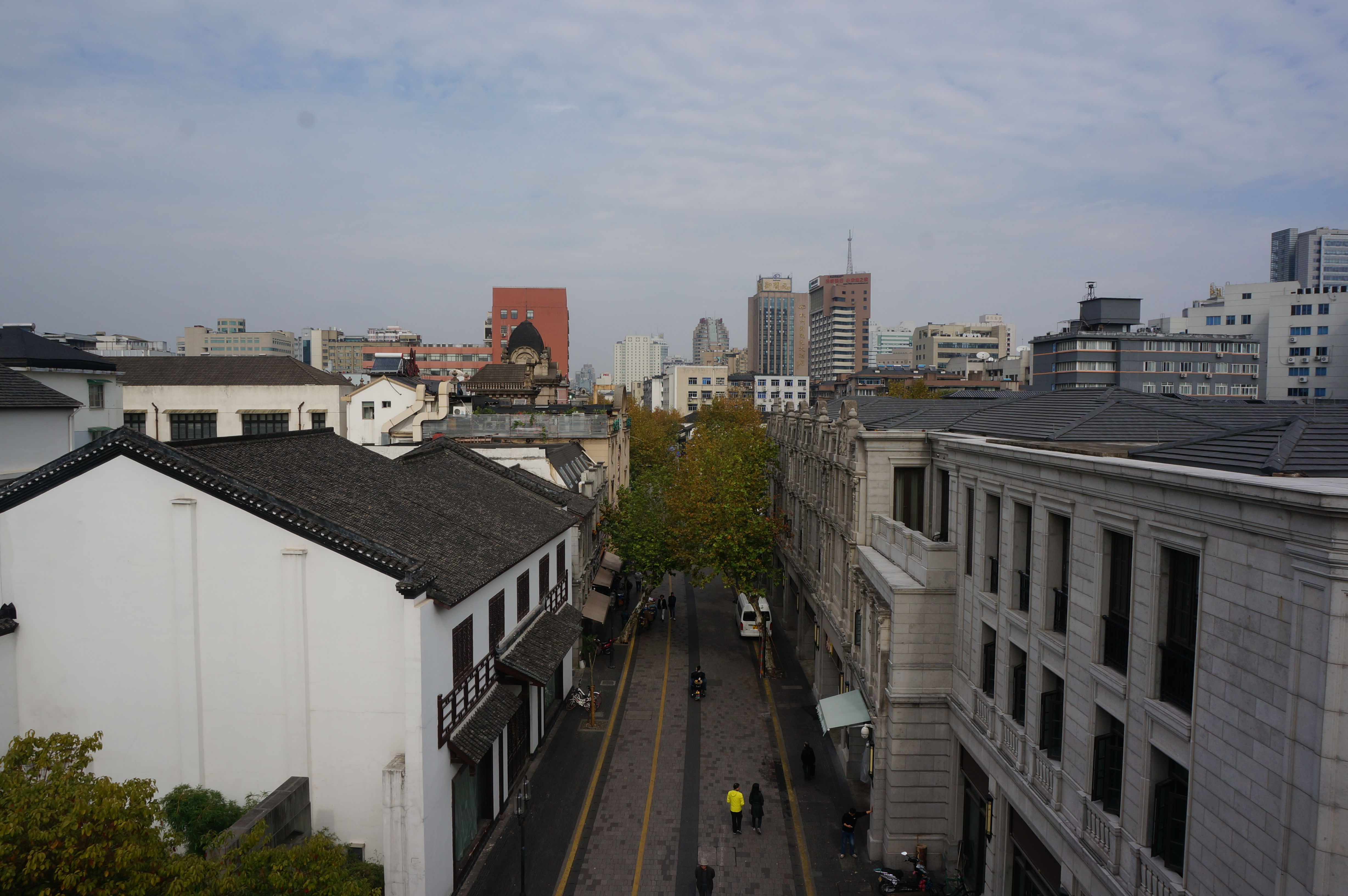 杭州中山中路，自与西湖大道交叉口处天桥向北望。